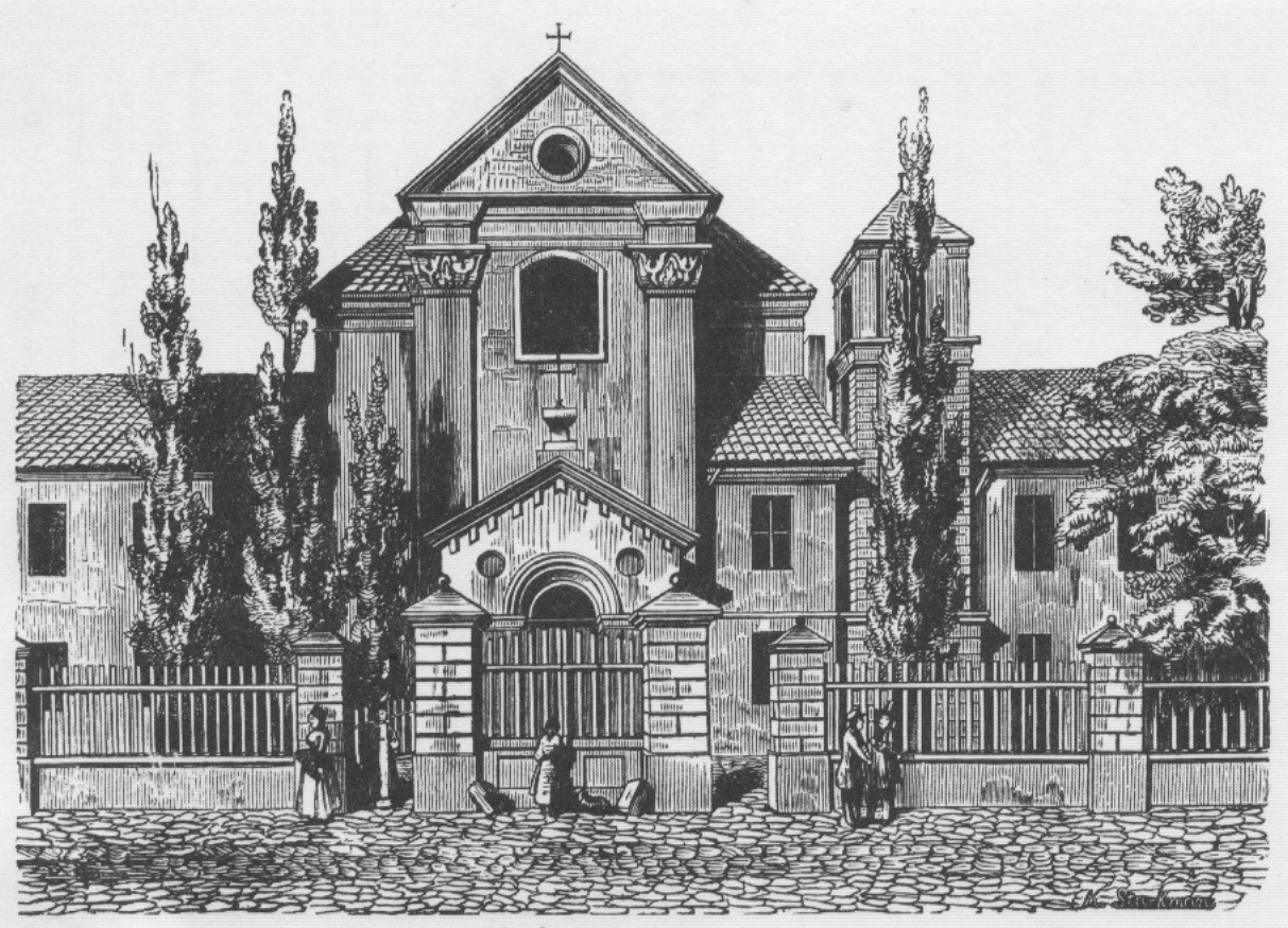 Kościół Św. Trójcy w Warszawie na Solcu (dawniej księży trynitarzy)